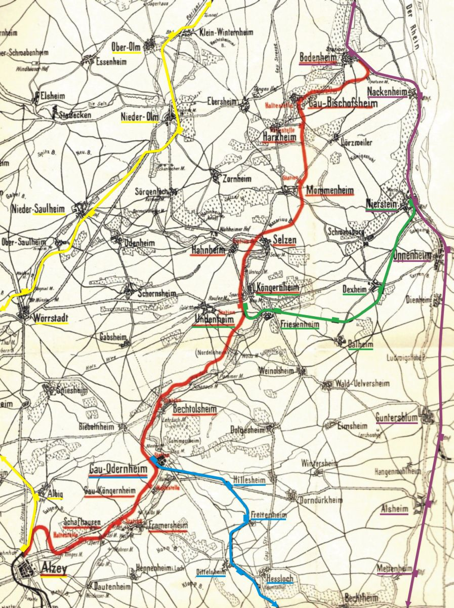 Bahnstrecken südlich von Mainz um 1896: Rot: Bahnstrecke Alzey–Bodenheim Grün: Bahnstrecke Köngernheim–Nierstein Blau: Teilstrecke der Bahnstrecke Osthofen–Gau Odernheim Gelb: Teilstrecke der Bahnstrecke Alzey–Mainz Lila: Teilstrecke der Bahnstrecke Mainz–Ludwigshafen